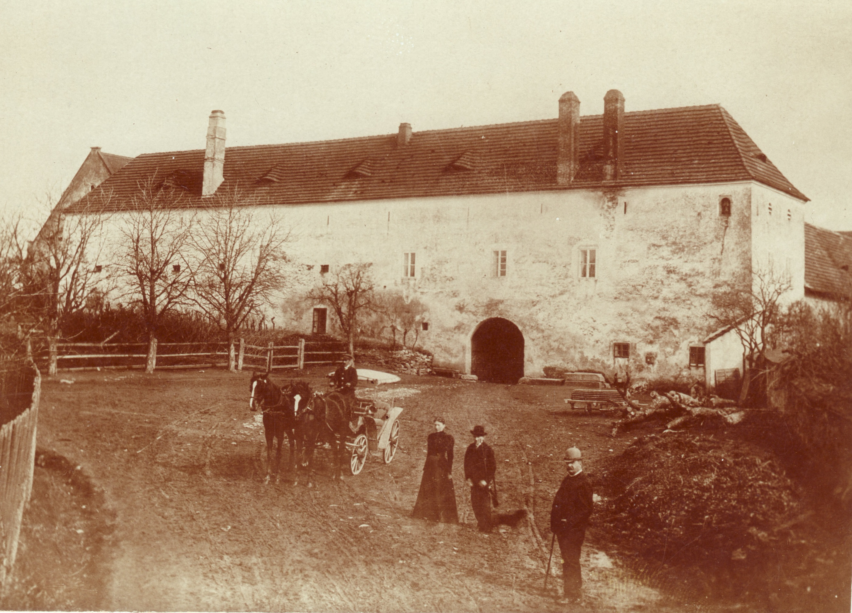 Hlavní budova s vjezdem do dvora